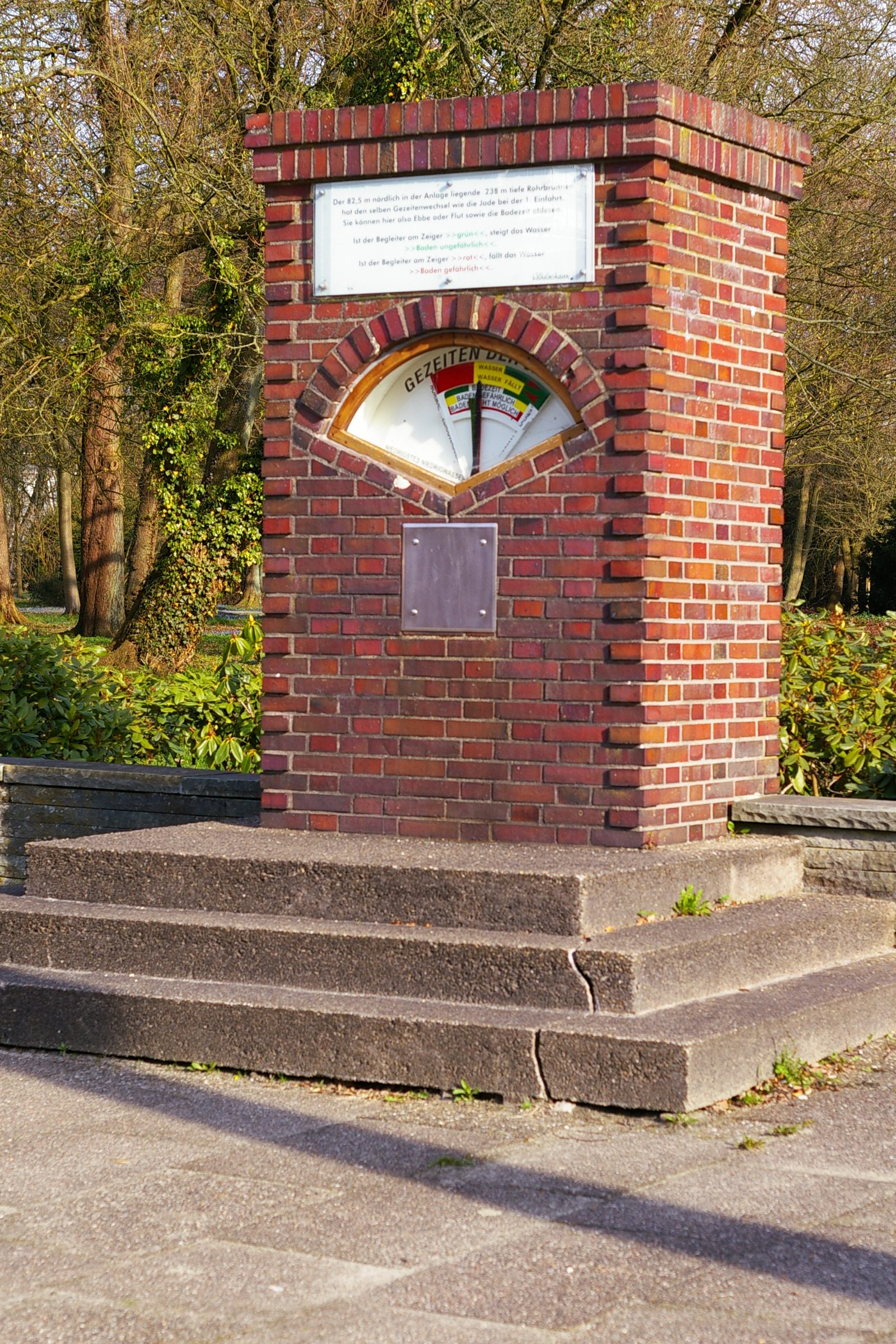 Wilhelmshaven Gezeitenzeiger